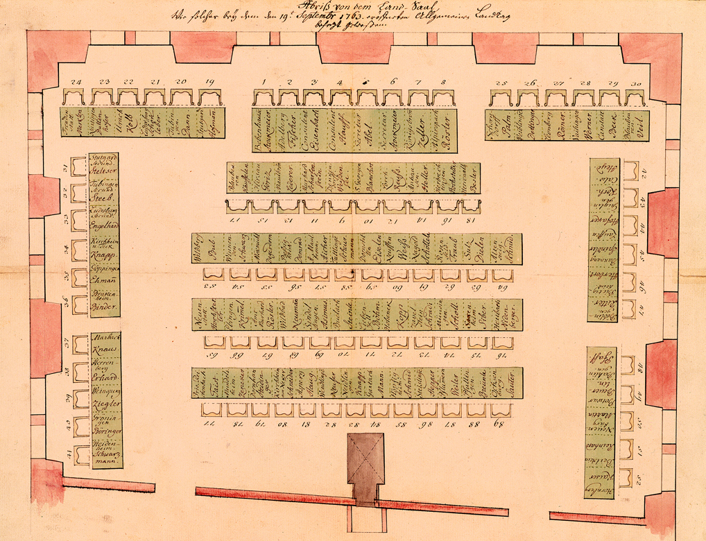 Zusammensetzung des württembergischen Landtags, 1763 (HStAS A 203 Bü 142)